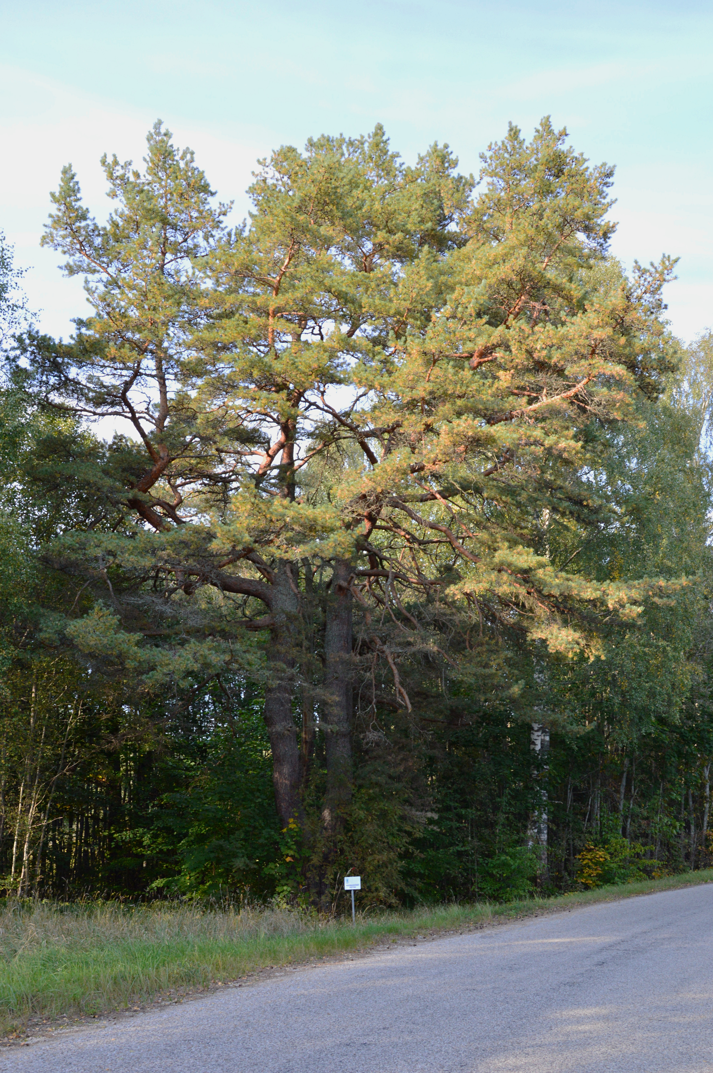 Koobaskõsõ pettai ehk Kapera mänd.